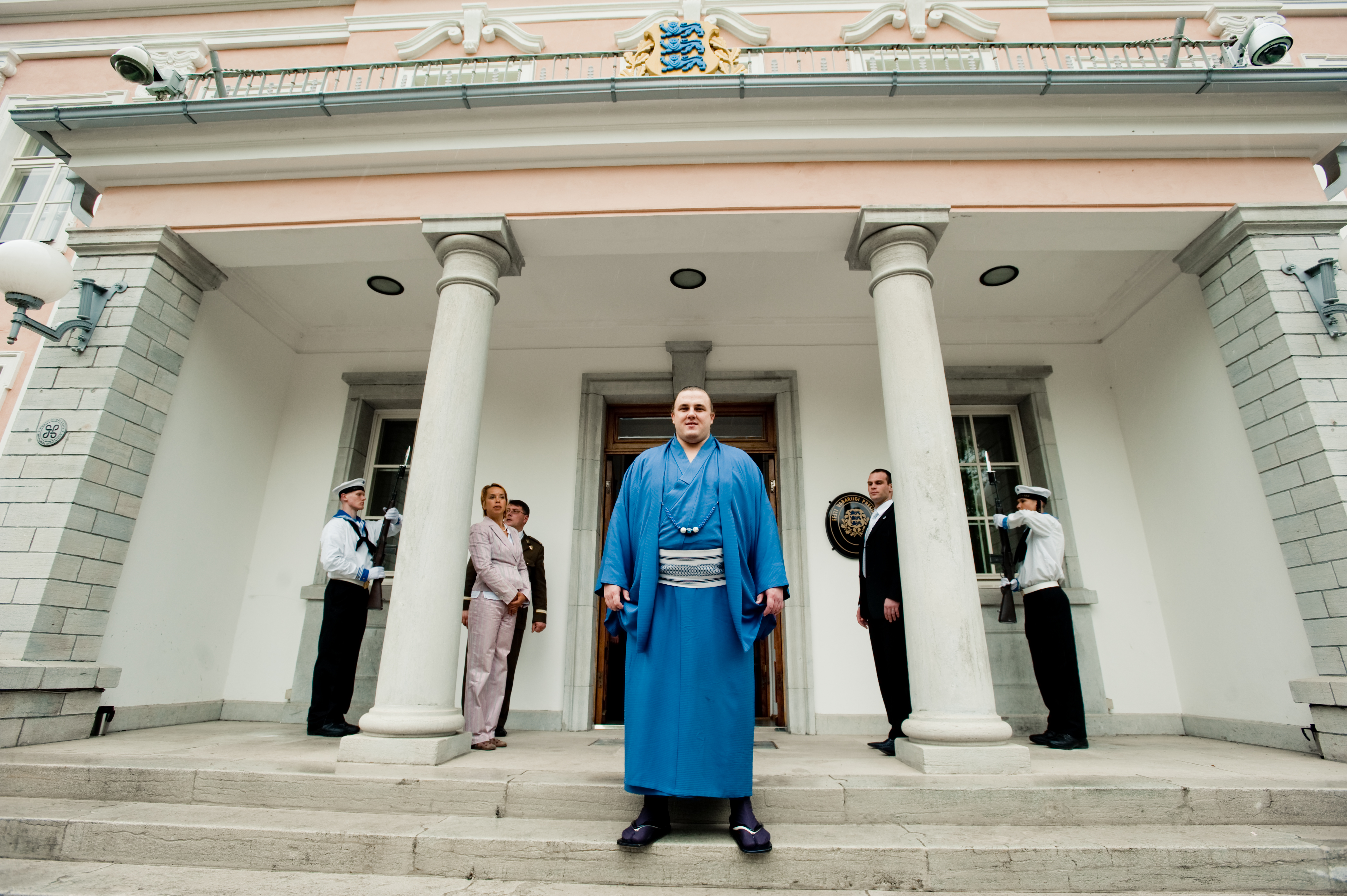 Teenetemärgi üleandmine Barutole.